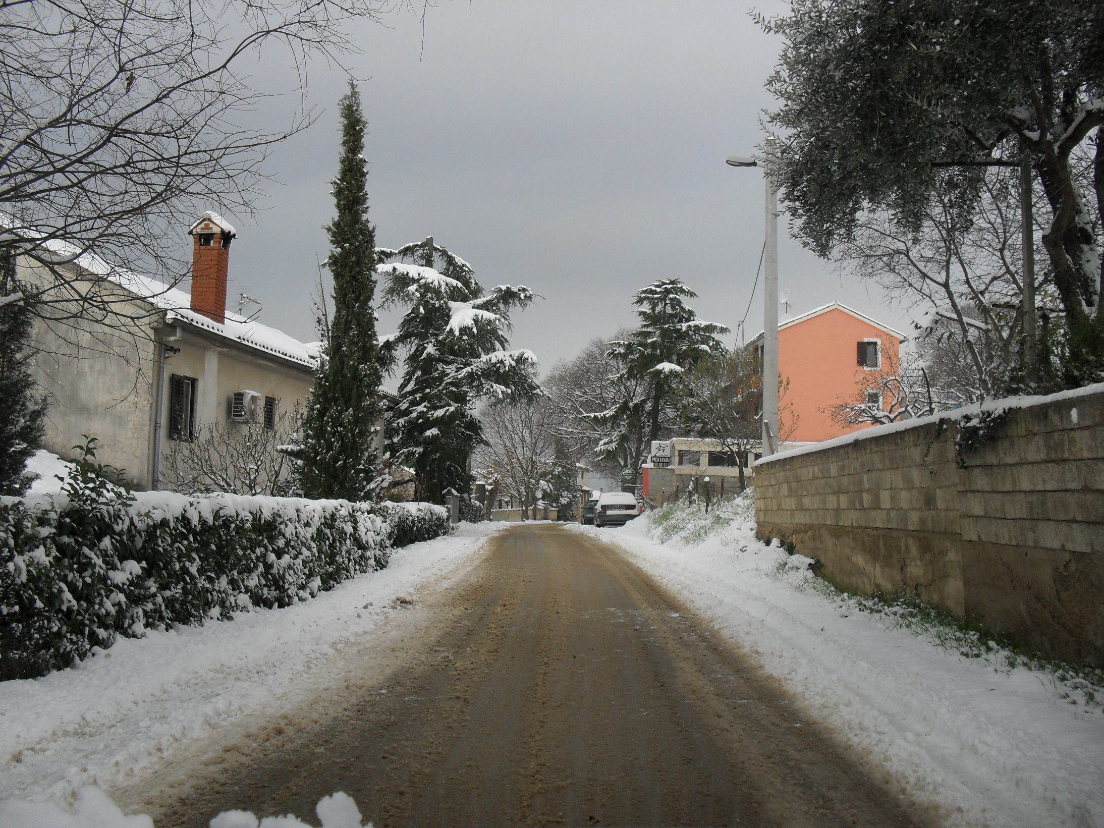 mugeba 19 12 2009